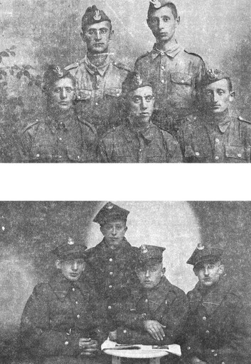 חיילים יהודים